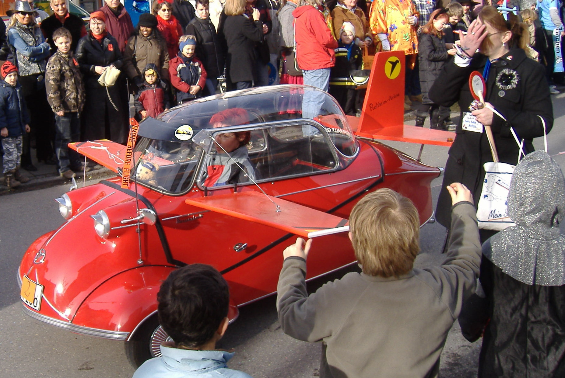 Olching Faschingsumzug Baustelle